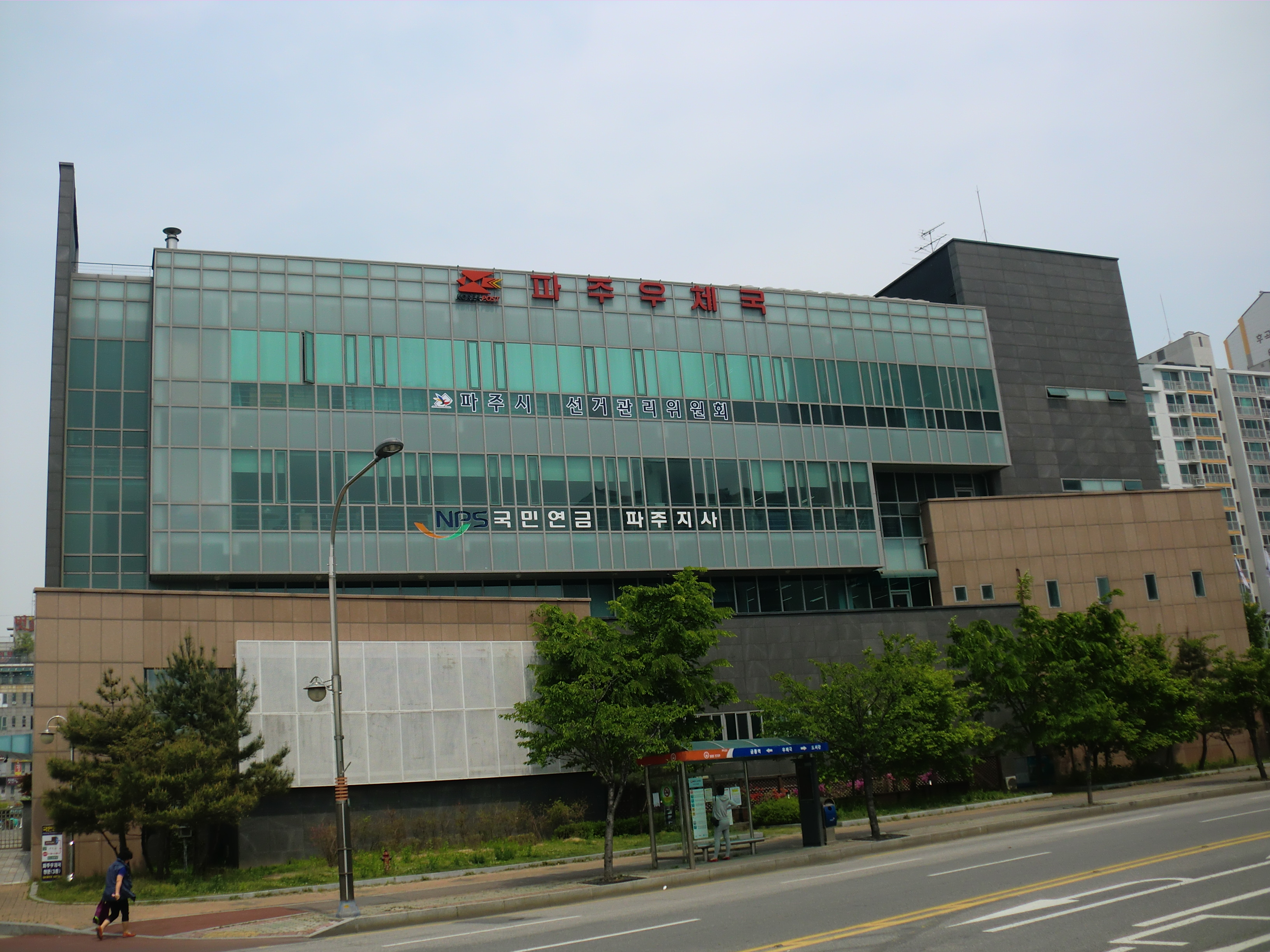 경기도 파주시에 있는 파주우체국